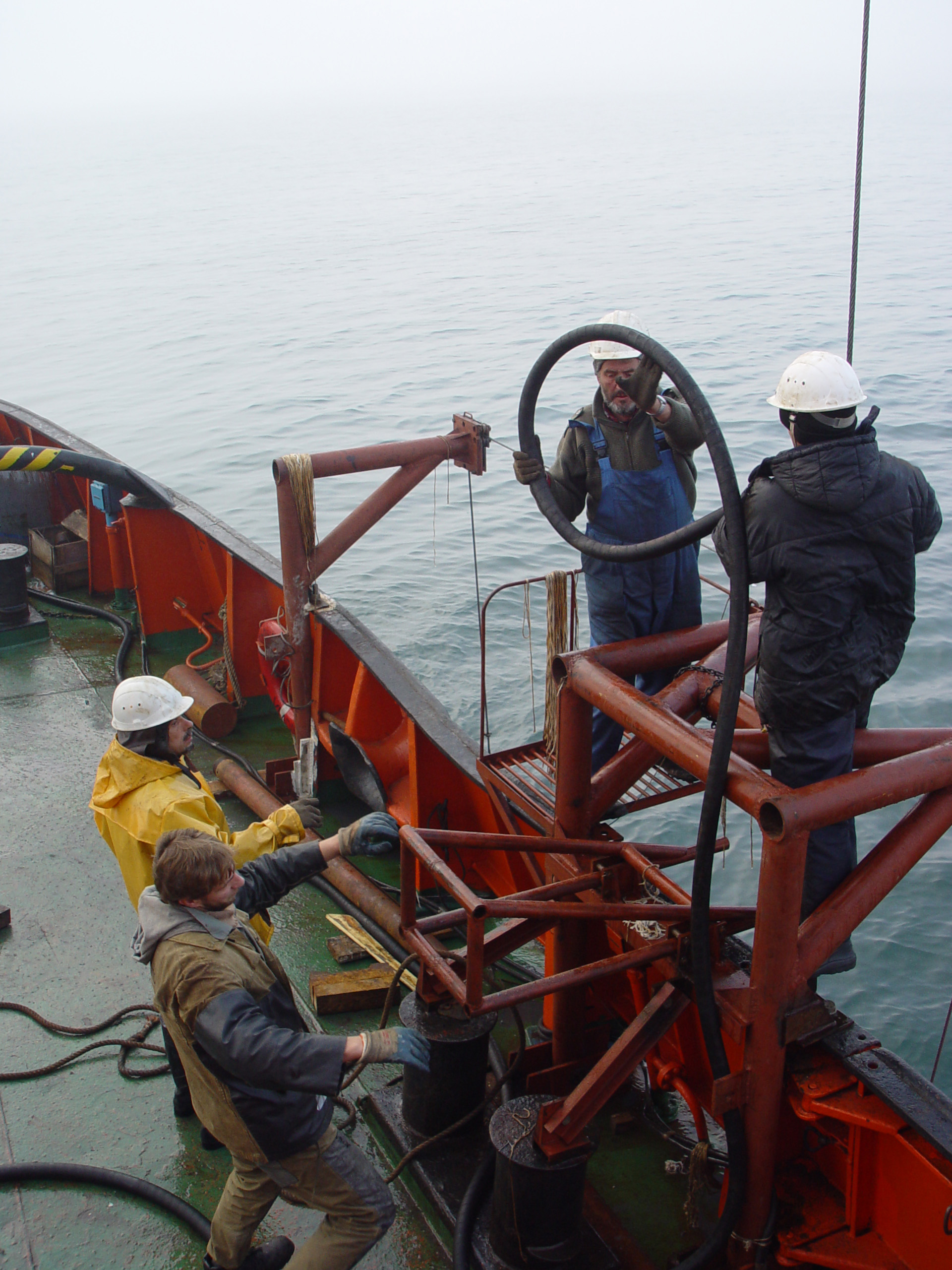 ВНИИОкеангеология: Морское бурение